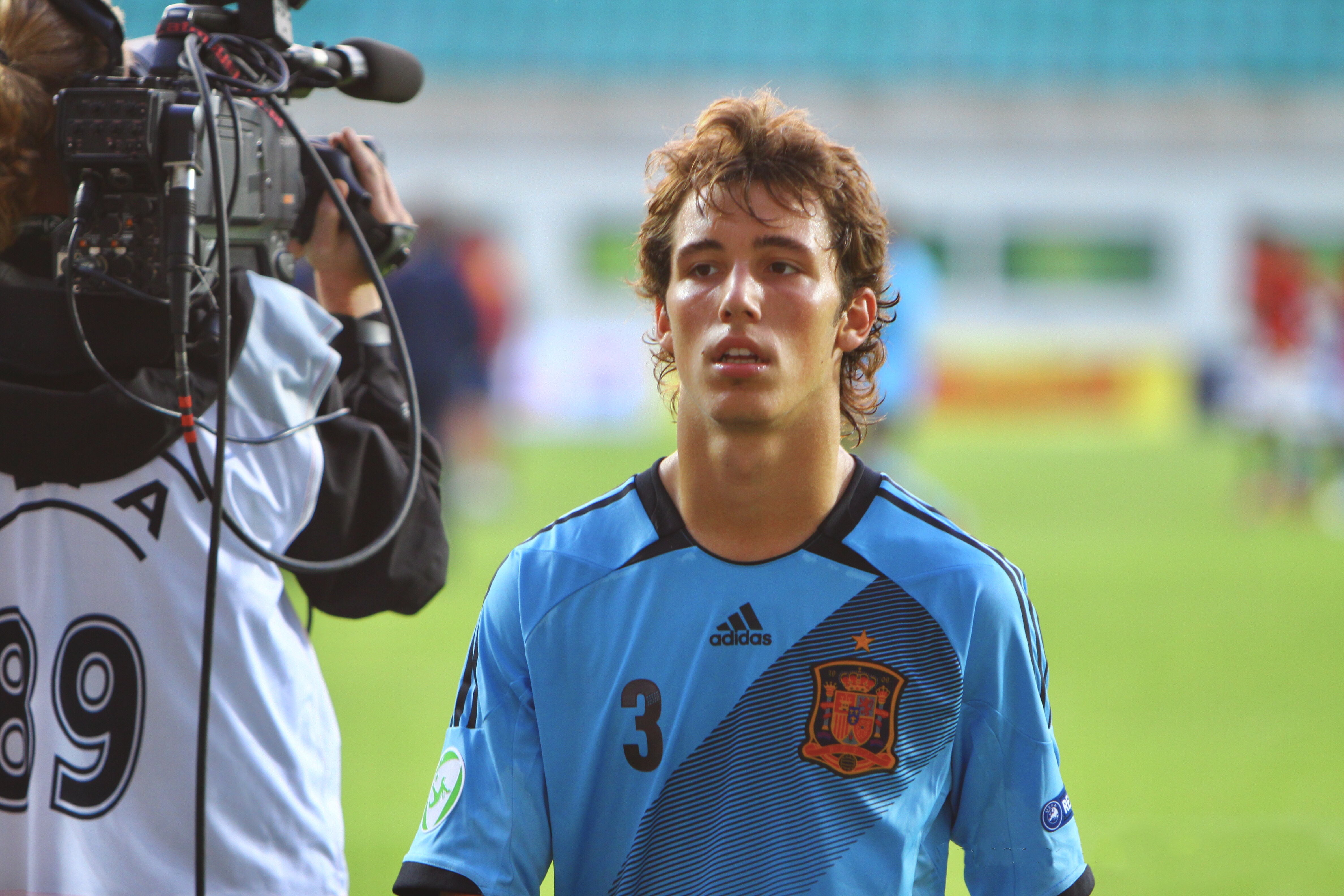 U-19 Portugal vs Spain.